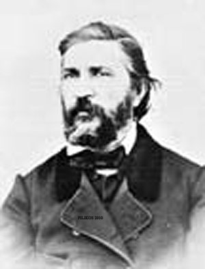 Eigenportait des griechischen Künstlers und Fotografen Filippos Margaritis